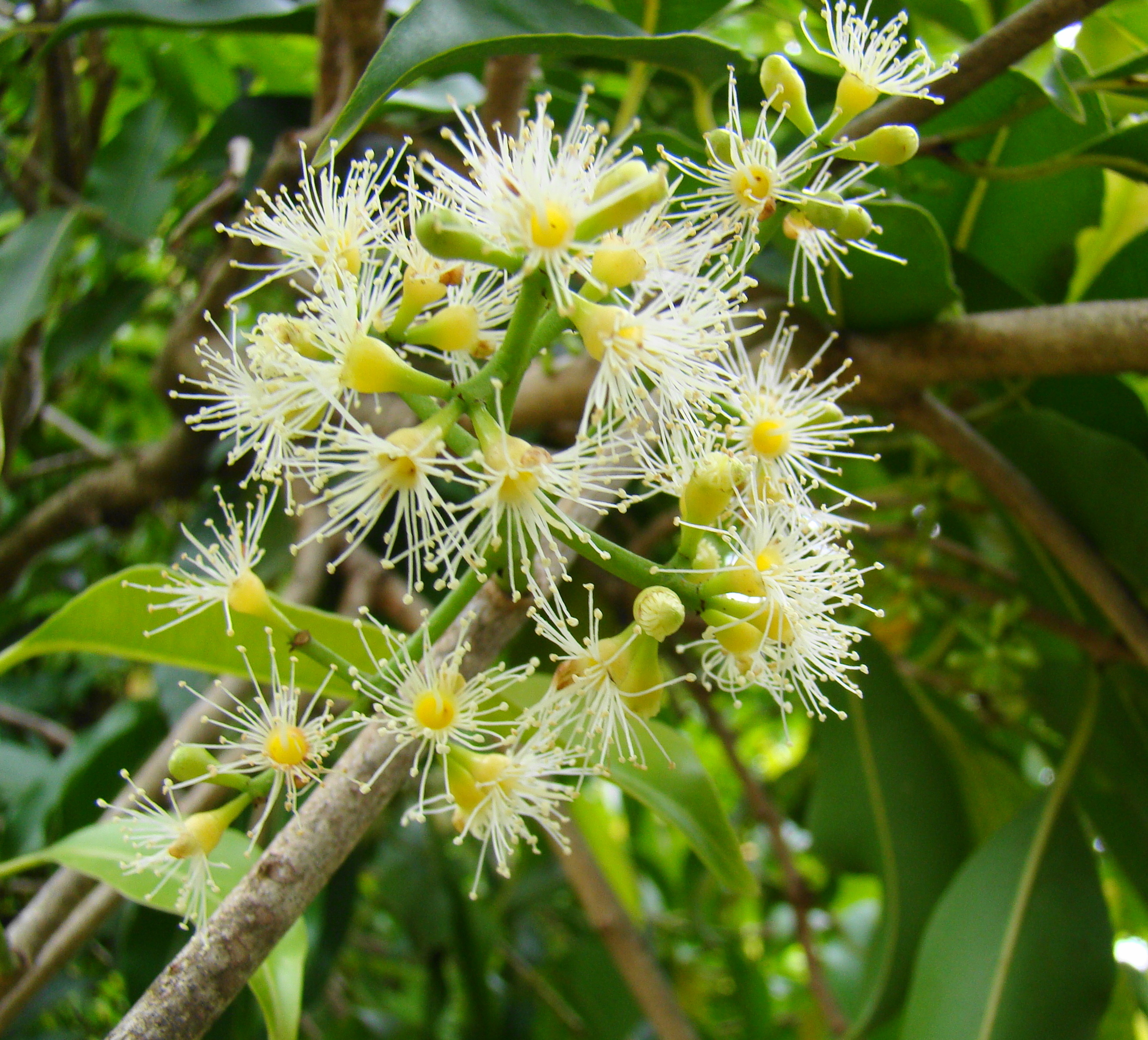 cERET pARK SAO PAULO